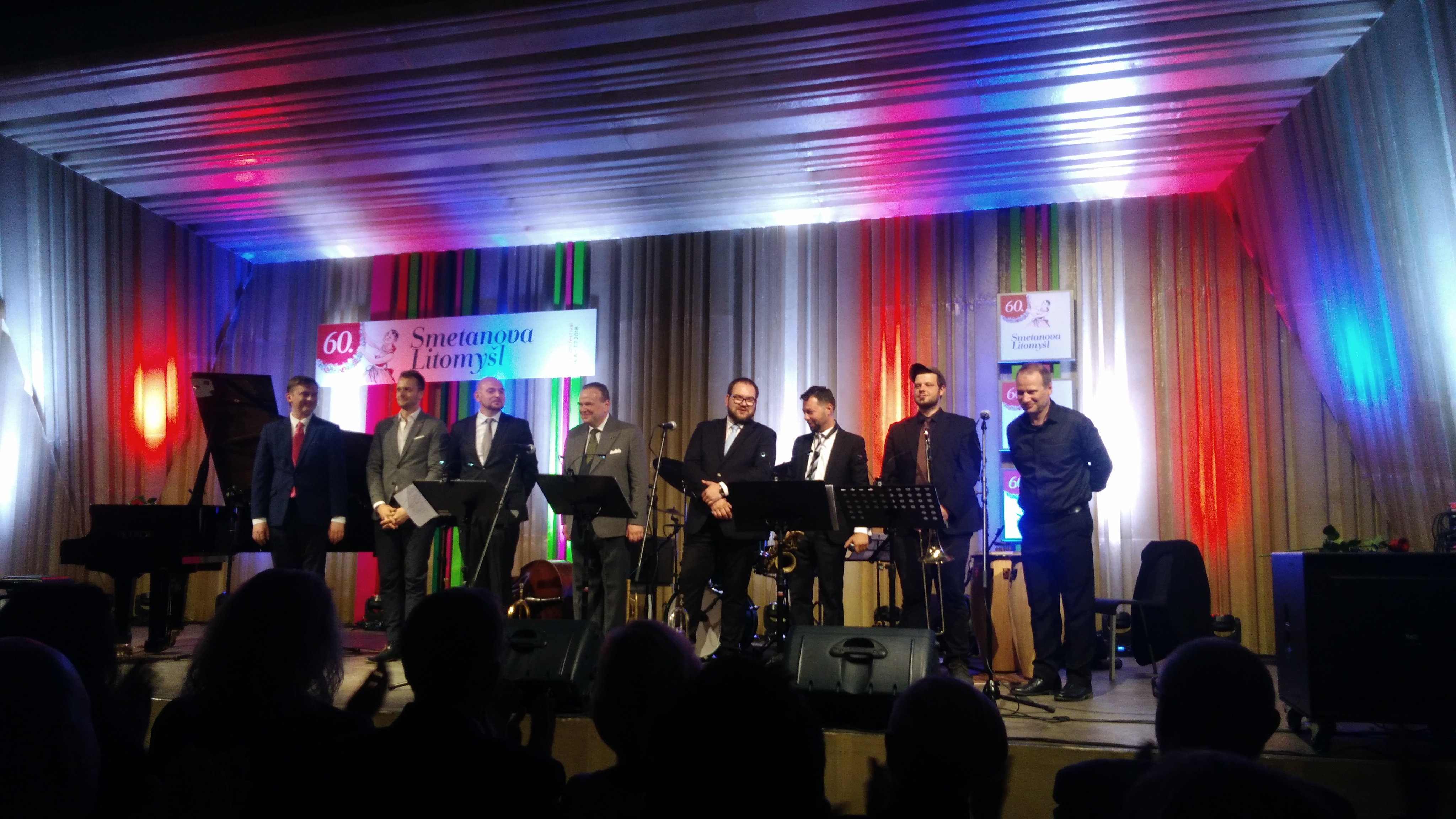 Smetanova Litomyšl 2018. Litomyšl, Česká republika.